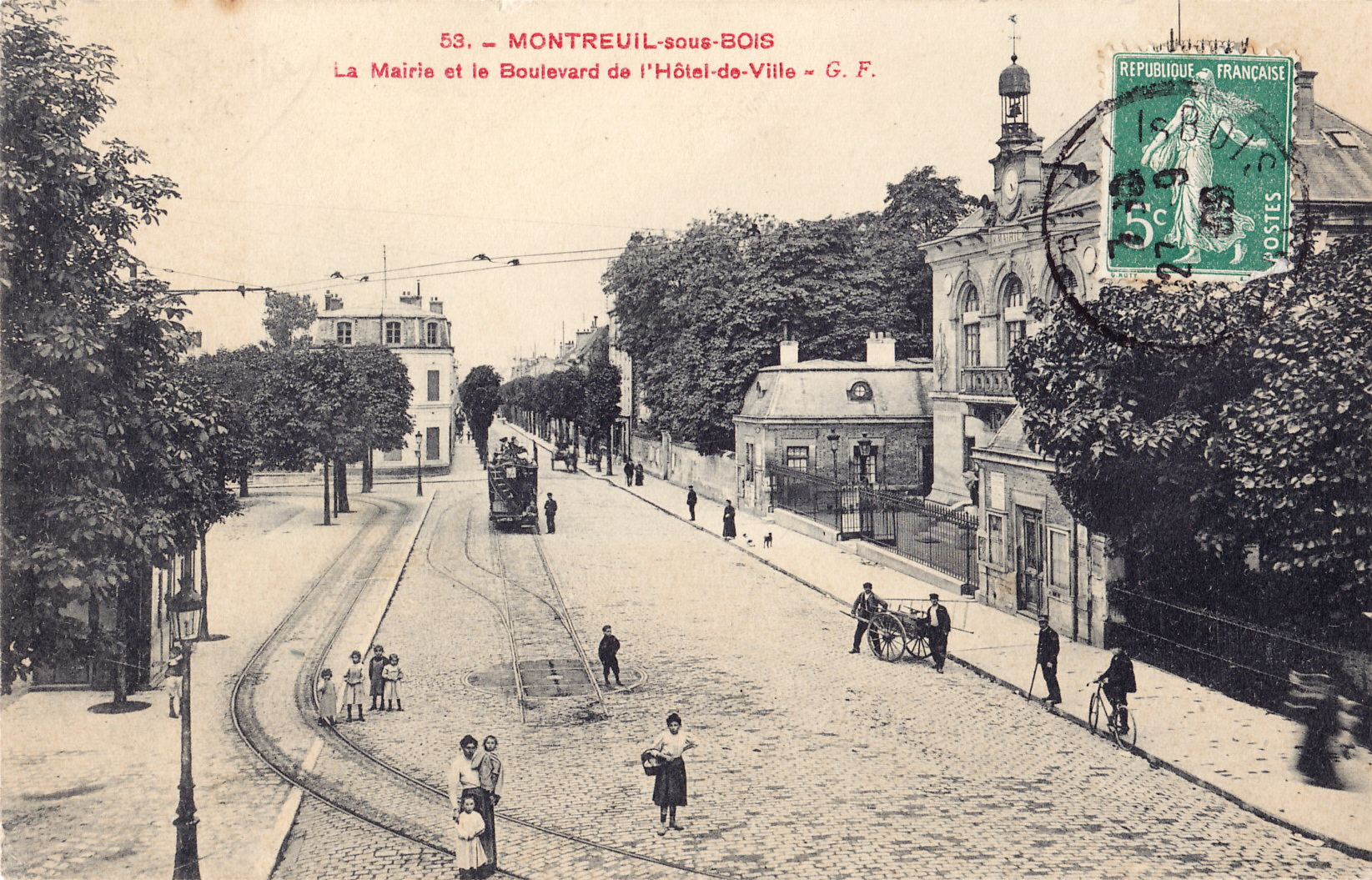 Carte postale ancienne éditée par GF, n°53 :MONTREUIL-SOUS-BOIS - La Mairie et le Boulevard de l'Hotel-de-Ville